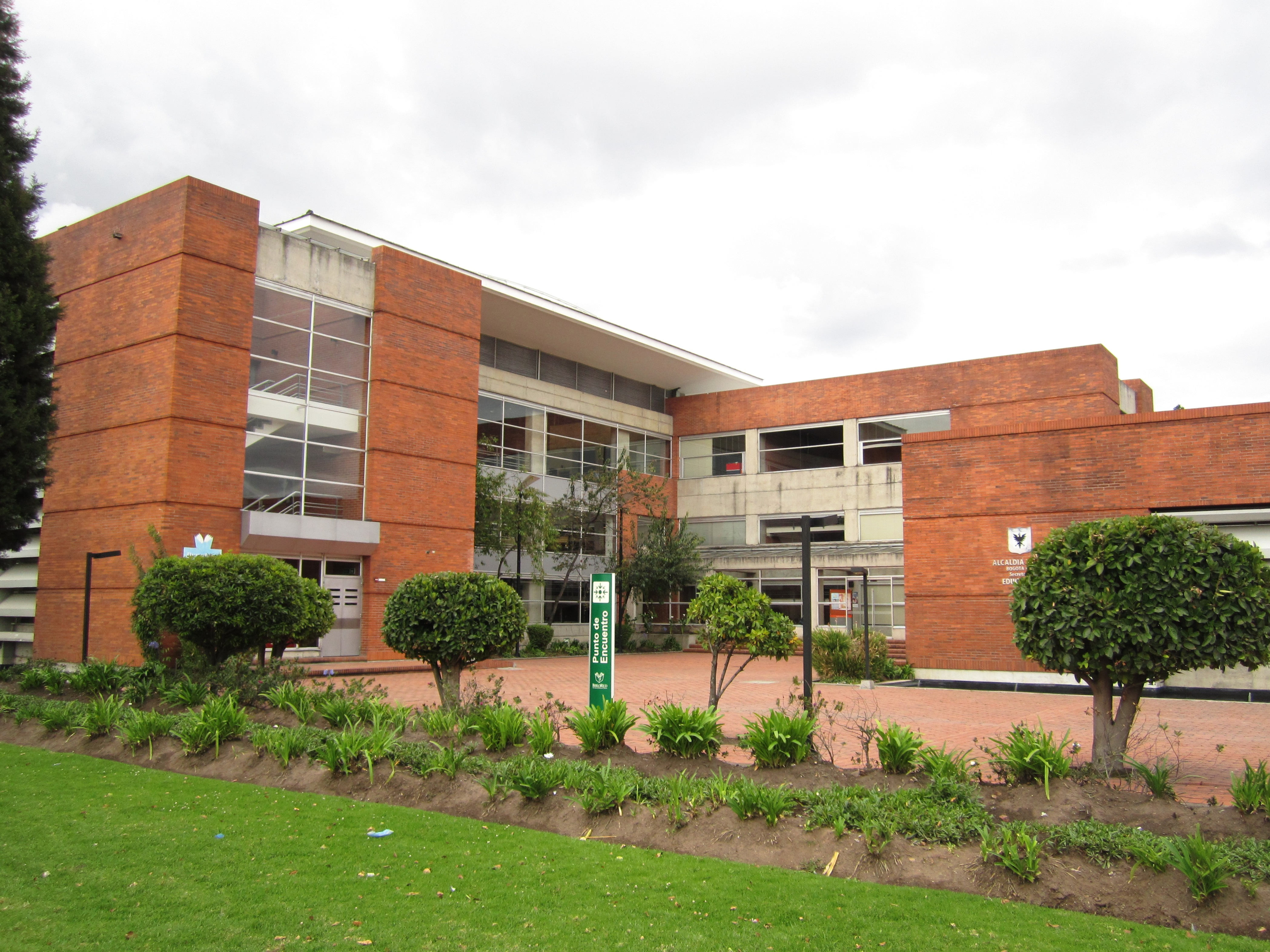 Biblioteca El Tunal en Bqogotá.